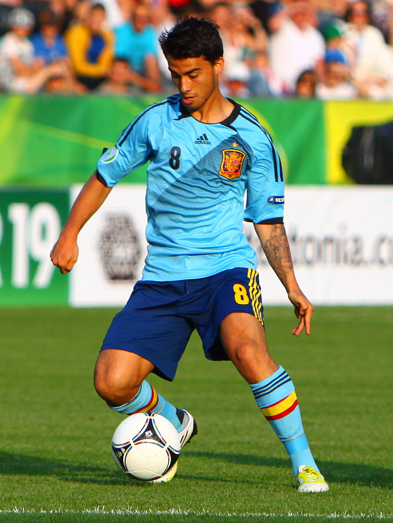 U-19 Portugal vs Spain.